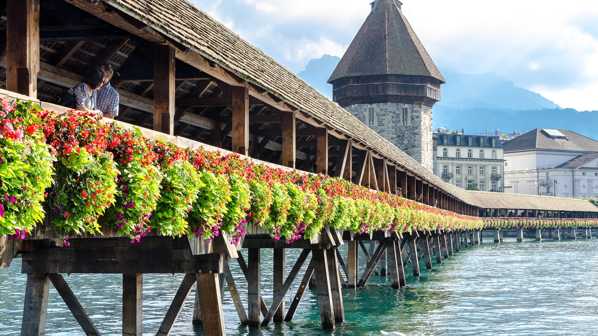 Il ponte Kapellbrücke a Lucerna adornato con dei fiori.